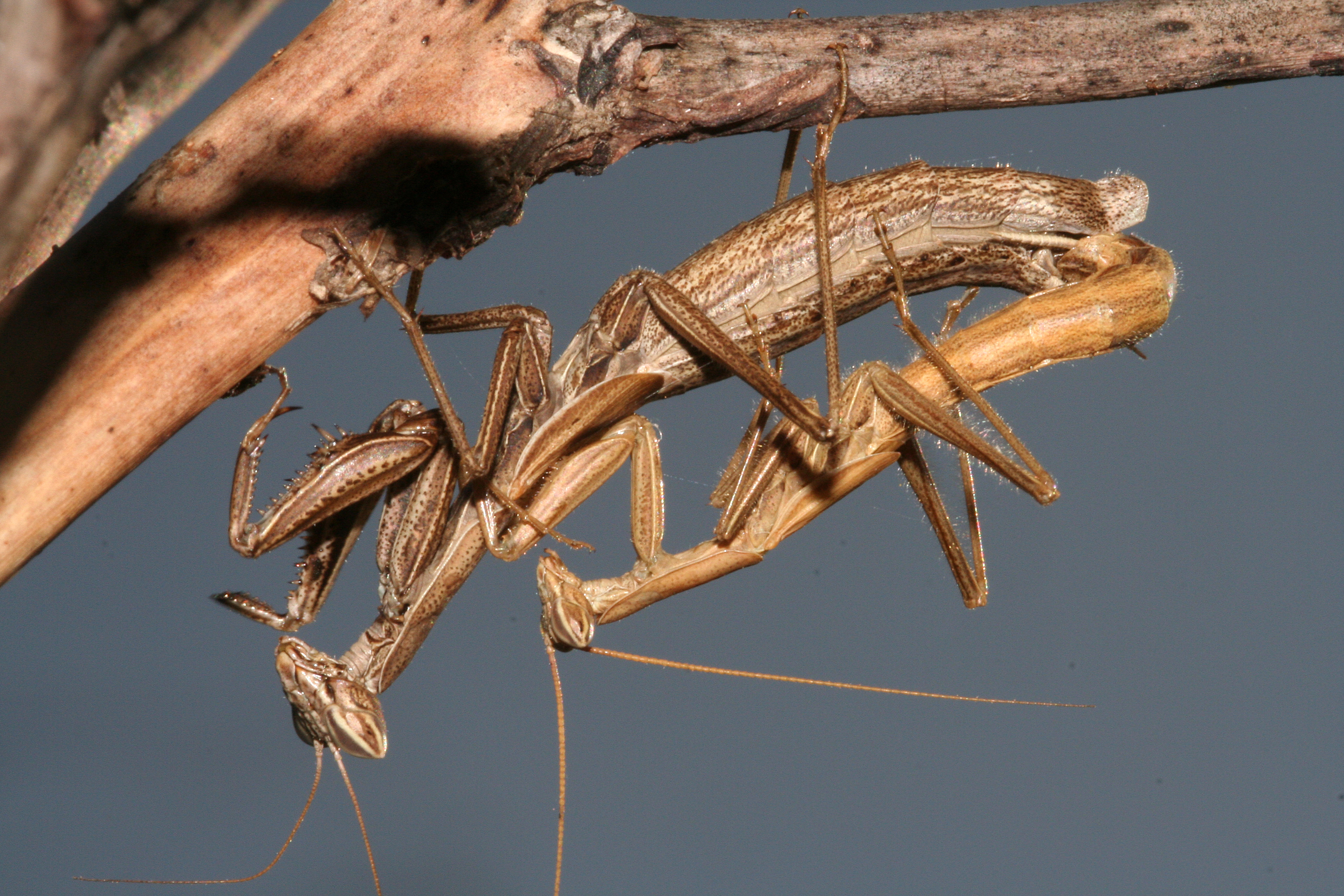 Pseudoyersinia lagrecai in copula.Cozzo Bomes - RNO Bosco di Granza - Palermo (Italy).